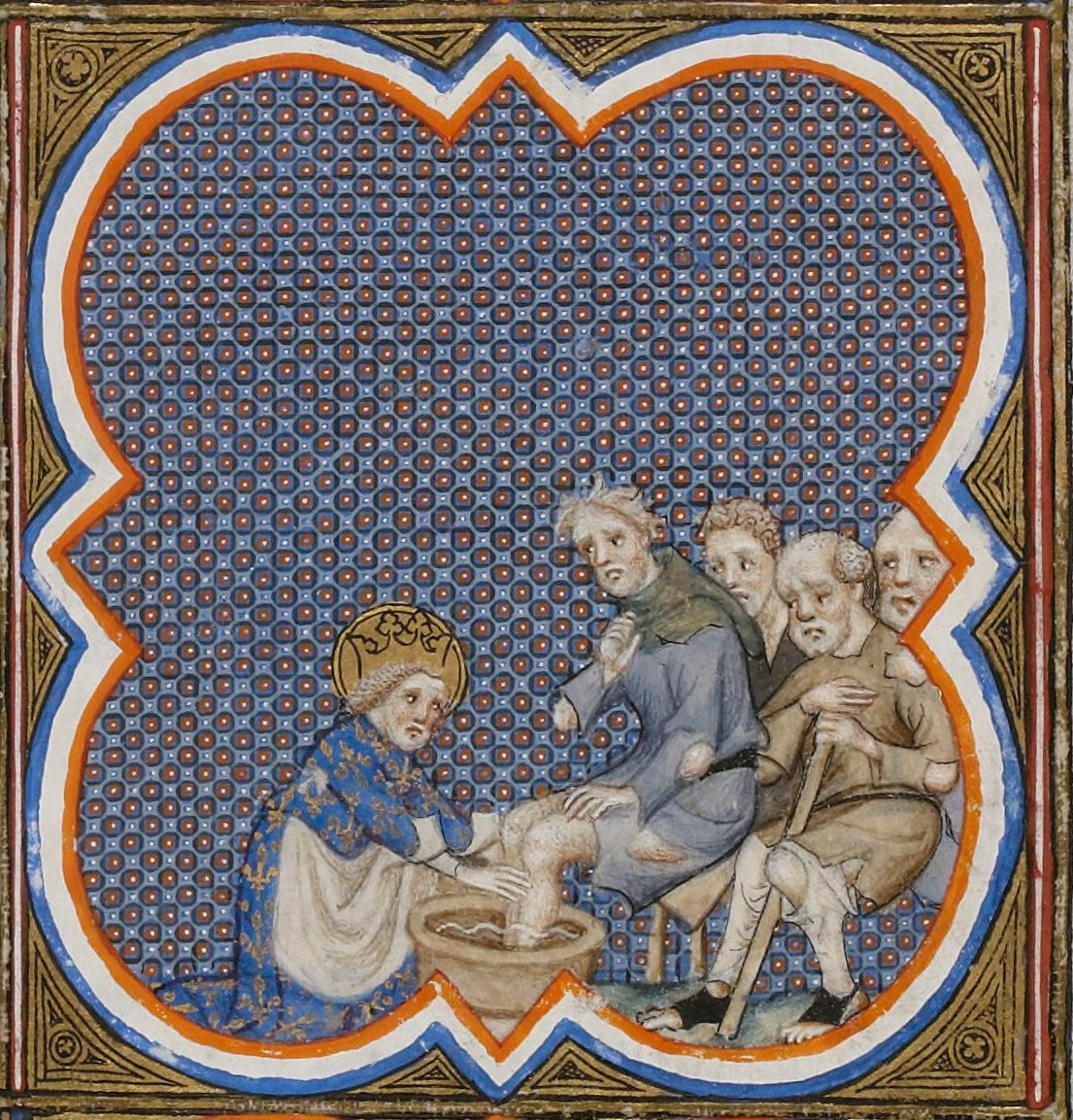 Saint Louis lave les pieds d'un mendiant. Scènes de la vie de saint Louis. Enluminure des Grandes Chroniques de France, XIVe siècle. Paris, BnF, département des Manuscrits, Français 2813, folio 265 recto.